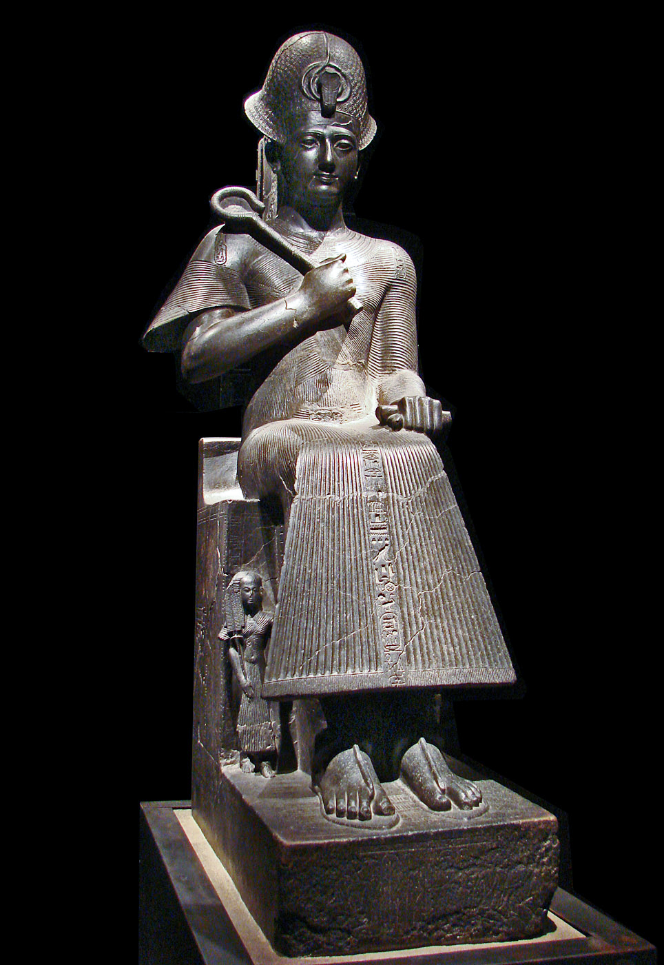 Le Roi Ramses II (1279-1213 avant J.C.), diorite (d'un gris sombre, presque noir), H. 194 cm., 19ème dynastie, temple d'Amon, Thèbes? N° inv. 1380